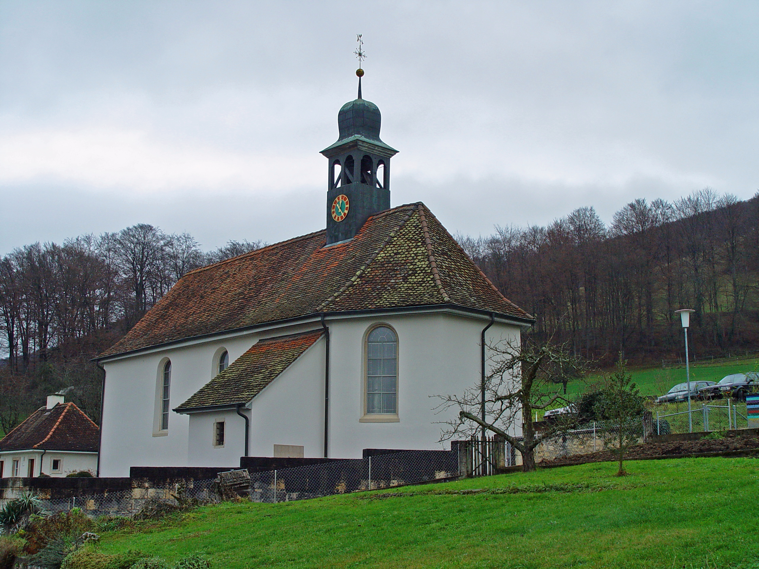 Kirche von Nenzlingen mit dem Friedhof davor.